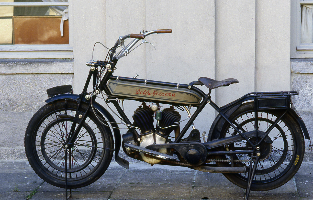 Motocicletta con telaio tubolare e parafanghi verniciati di nero, mentre il serbatoio è verniciato di grigio. Nella parte centrale del telaio è installato un motore bicilindrico a V, a quattro tempi, con valvole laterali. Al di sopra del motore è sistemato il serbatoio di carburante e lubrificante; sul lato superiore è presente la pompa a mano dell'olio. Su lato sinistro del serbatoio è sistemata la leva del cambio, con pomello nero. Ai lati del motore sono installate due pedane poggiapiedi. La trasmissione è a catena. La ruota posteriore è sprovvista di sospensioni, mentre la ruota anteriore è dotata di forcella elastica si in verticale che in orizzontale. La motocicletta è dotata di portapacchi posteriore, sui cui lati sono fissate due cassette portaccessori. Sul parafango anteriore è collocato il tagliavento. I cavalletti reggimacchina sono presenti su entrambe le ruote. Notizie storico-critiche La casa costruttrice Della Ferrera si contraddistingua per l'affidabilità dei propri modelli; gli esemplari costruiti erano relativamente pochi, ma realizzati con estrema accuratezza. L'esemplare posseduto dal Museo Nazionale della Scienza e della Tecnologia "Leonardo da Vinci" è targato Torino: nel sistema utilizzato prima del 1927, con i numeri al posto delle sigle delle province, il numero 63 corrispondeva a Torino.